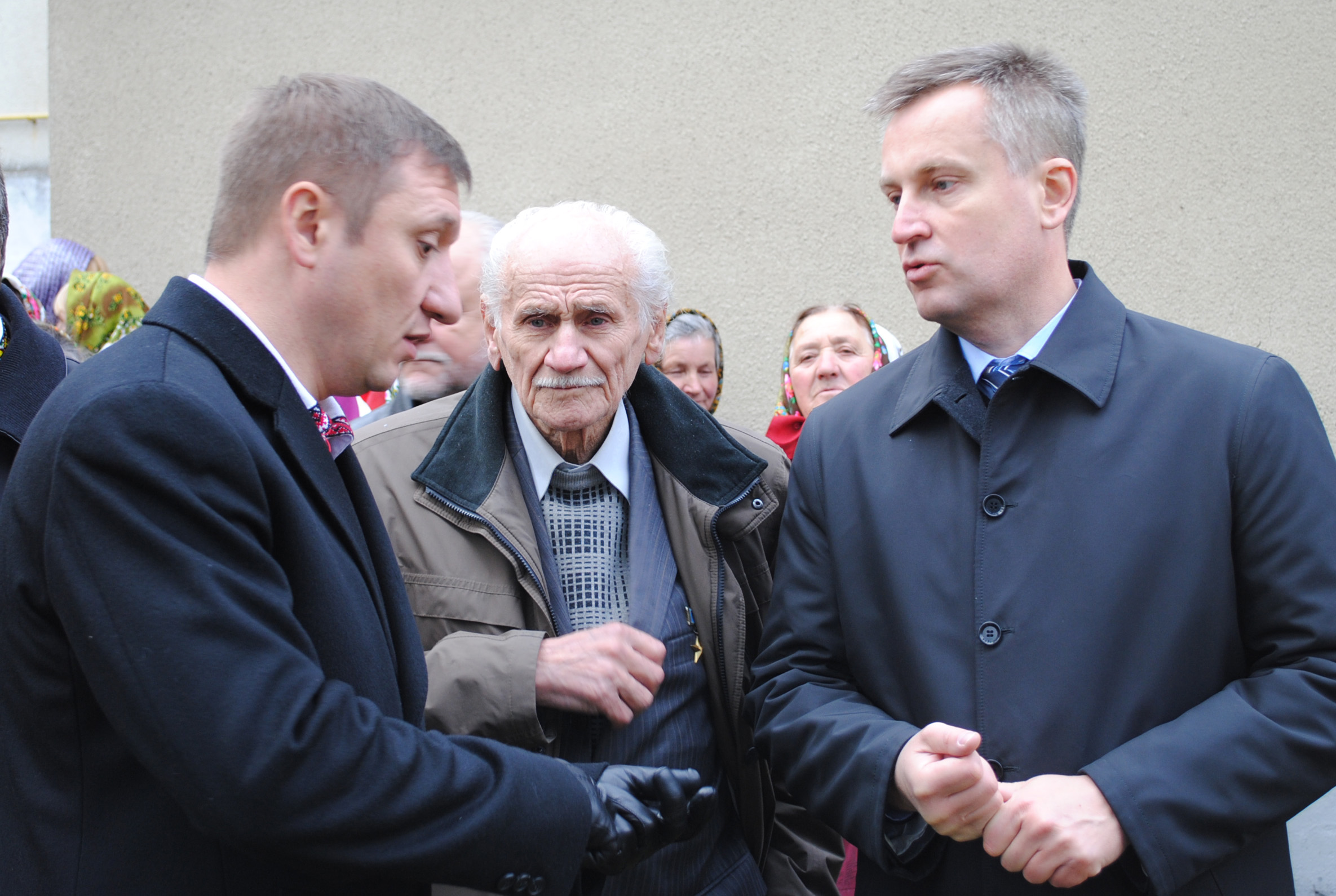 Олексій Кайда, Борис Возницький і Валентин Наливайченко у селі Рукомиш Бучацького району Тернопільської області.